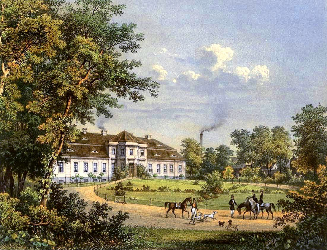 Rittergut Brunn, Kreis Ruppin, Lithographie von Alexander Duncker